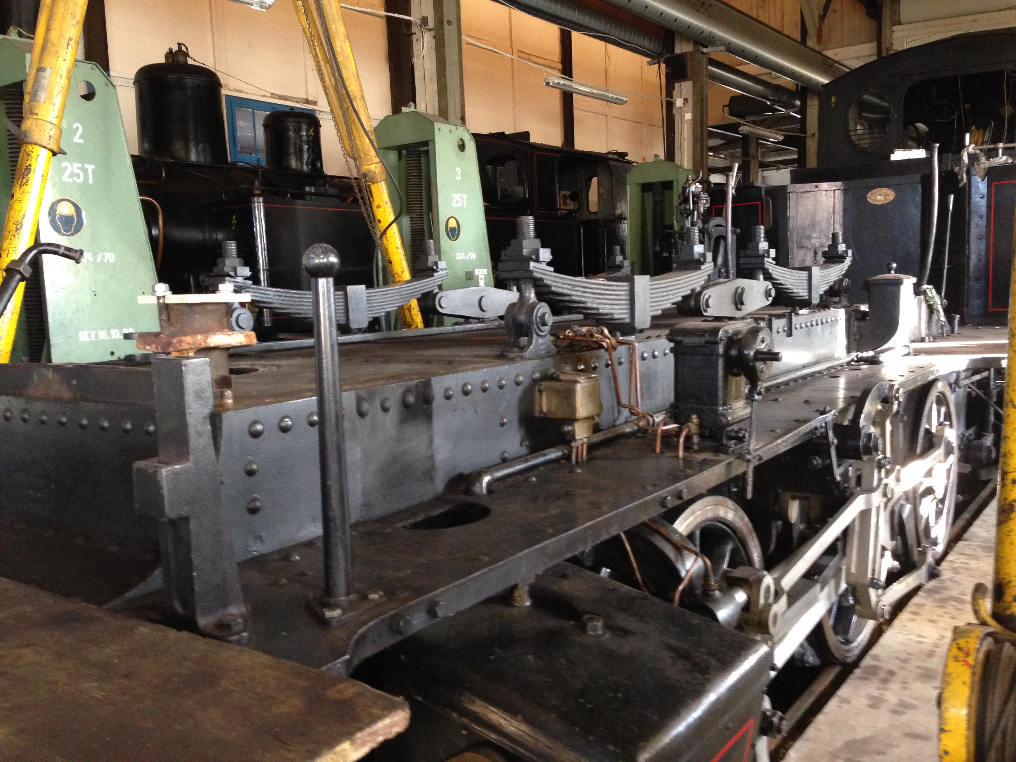 Dampflokomotive E 3/3 Lise der Dampfbahn Bern mit abgehobenem Kessel. Gut sichtbar ist nun der Wasserkasten.